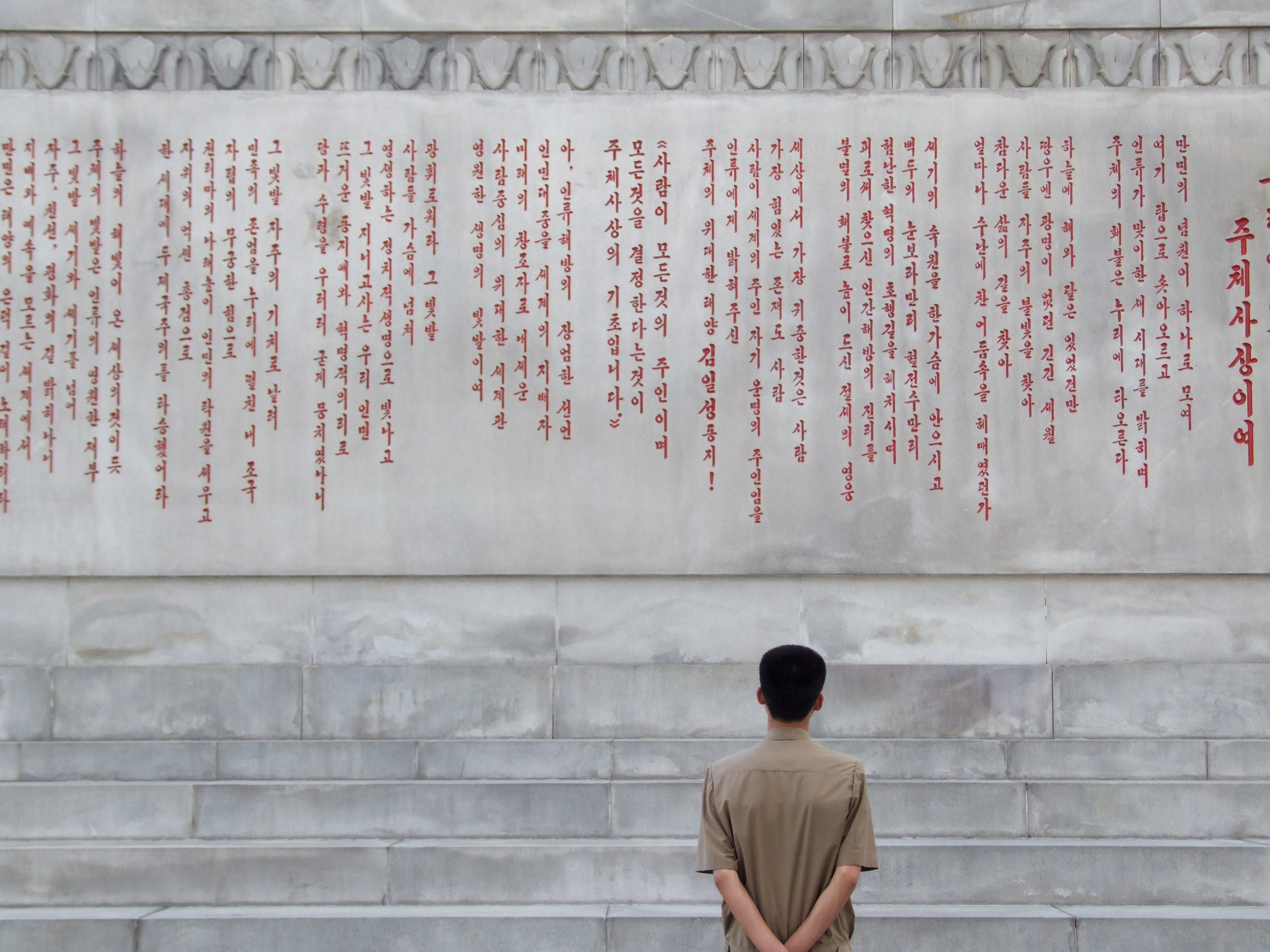 Nordkoreaner liest die Inschrift auf dem Chuch'e-Turm